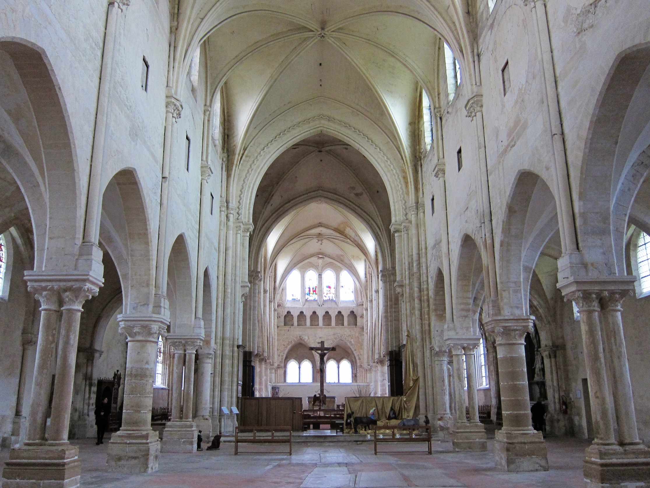 La nef de la collégiale de Champeaux (Seine-et-Marne).